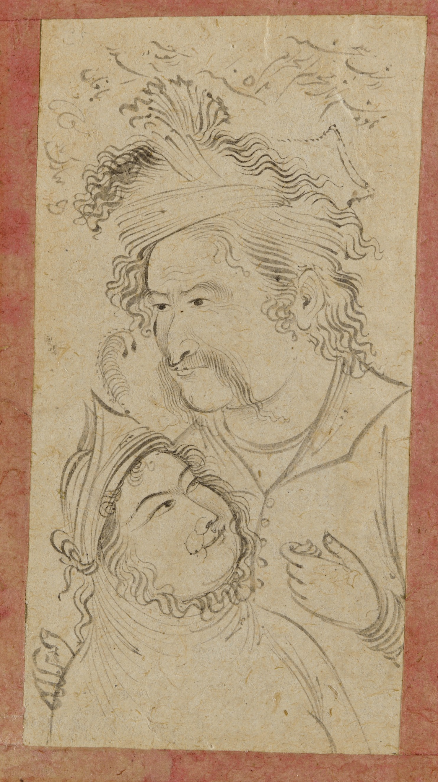 Муин Мусаввир Влюбленные 1642